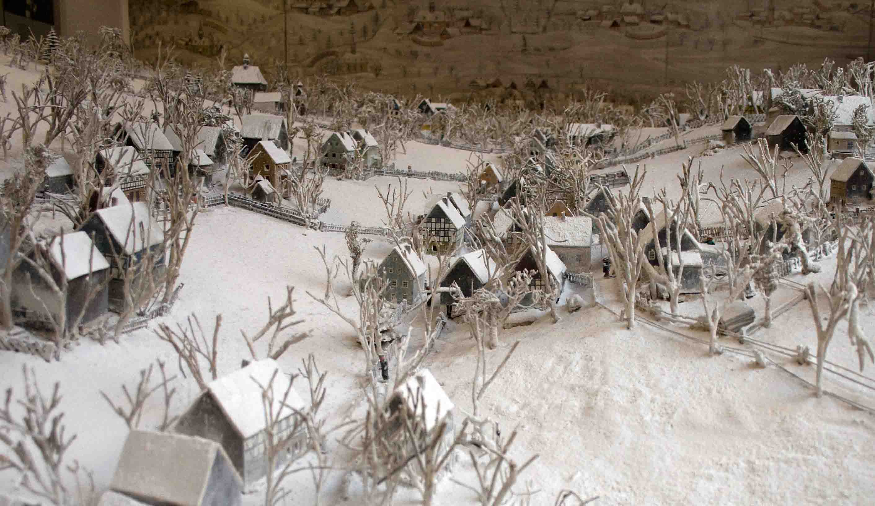 Modell Mauersberg Originalfoto